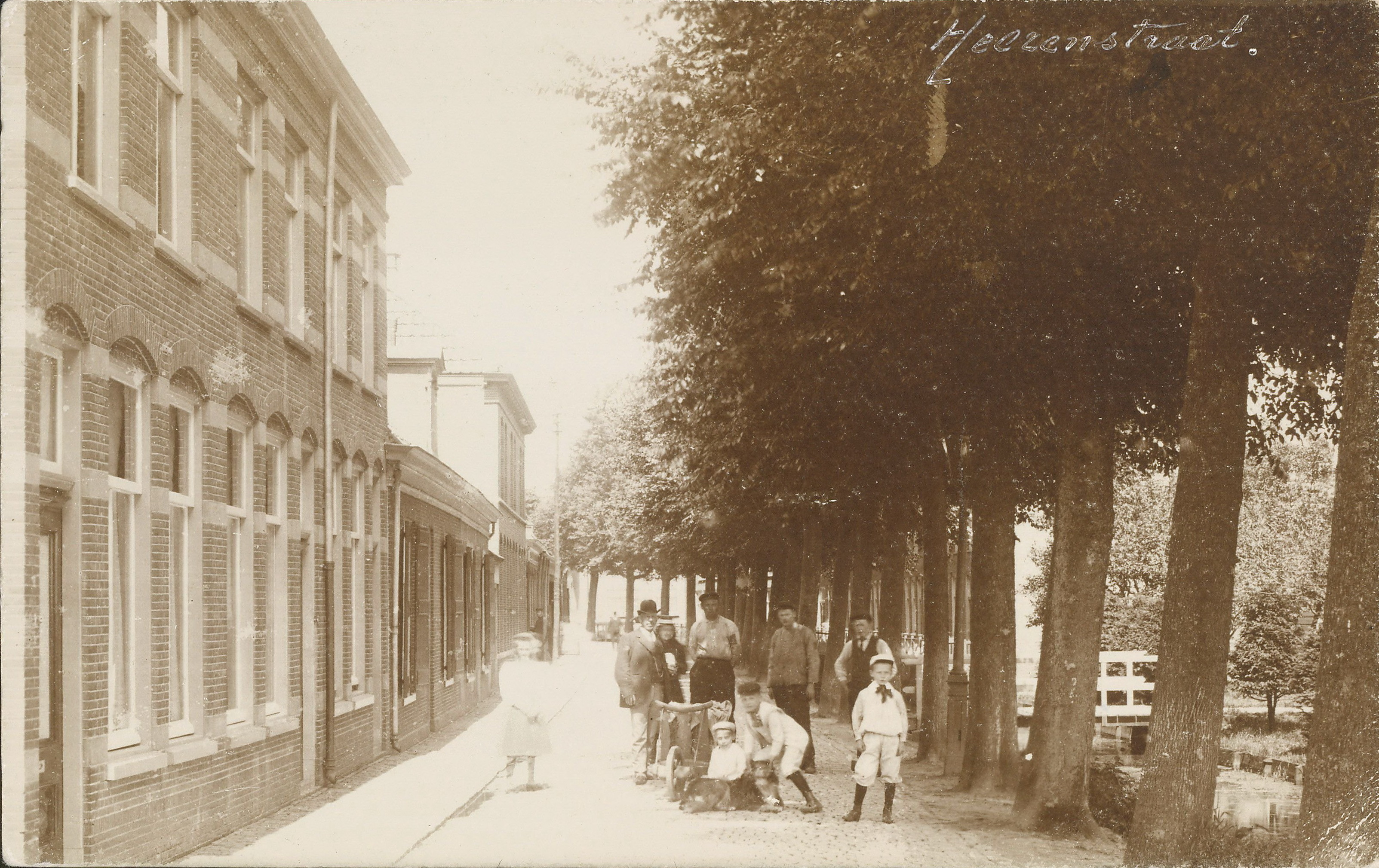 Gezien ter hoogte van de huidige Magdalena Moonsstraat naar het noorden in de richting van de huidige Drie Octoberstraat.